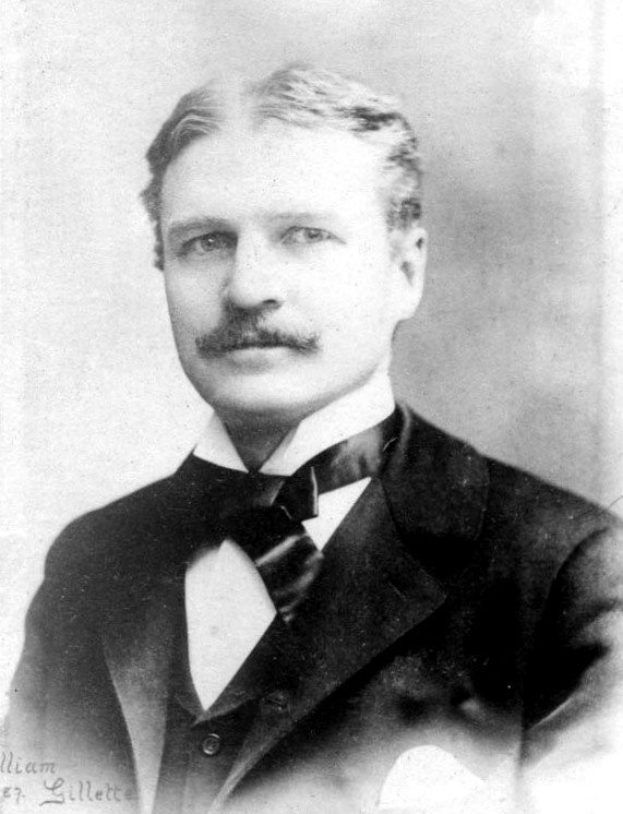 William Gilette